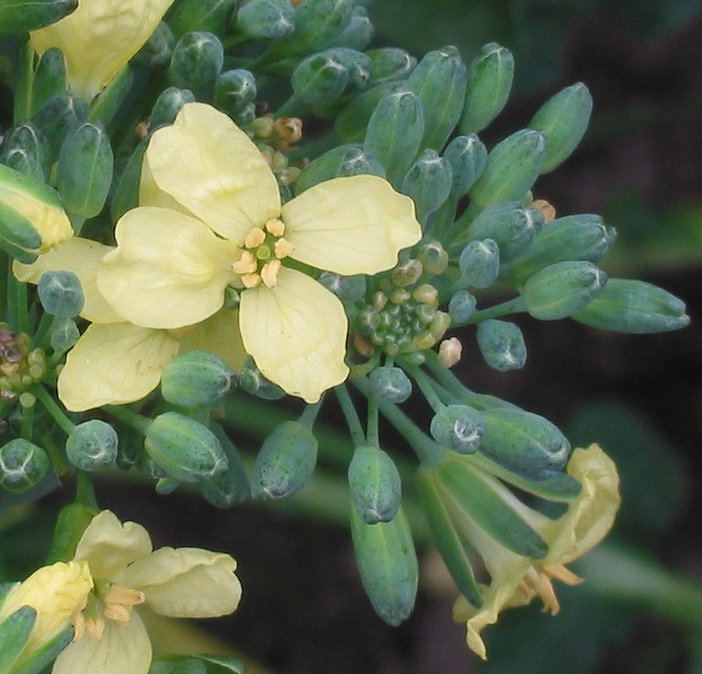 Broccoli